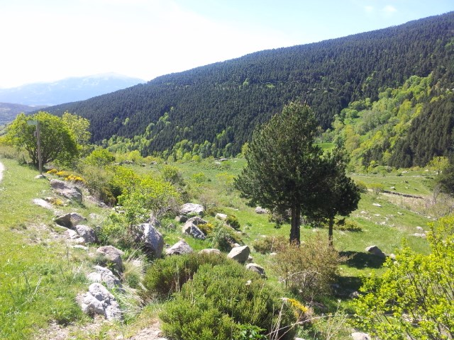 Tossa Plana de Lles-Puigpedrós This is a a photo of a natural area in Catalonia, Spain, with id: ES510205